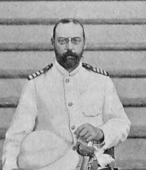 Príncipe Valdemar da Dinamarca